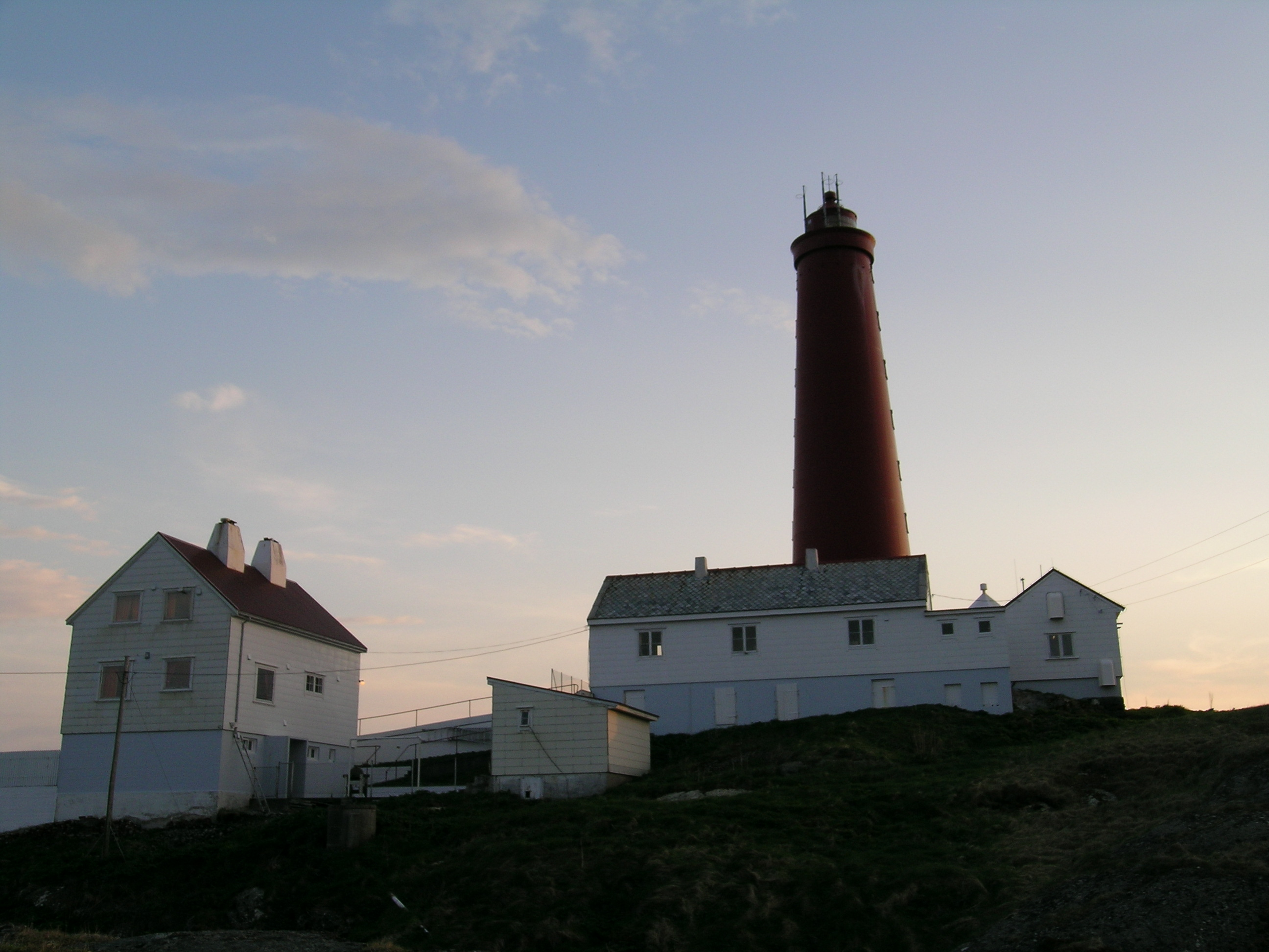 Utvær fyr eller Utvær fyrstasjon ligger i Solund kommune i Sogn og Fjordane. Utvær er det vestligste punktet i Norge, og ligger på øygruppa Utvær, et fredet naturreservat. Fyret har et rødt fyrtårn med lyskilde 45 m.o.h.